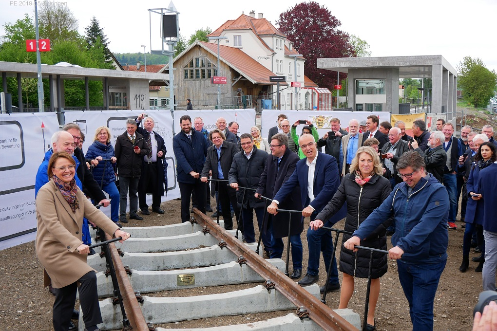 Anlässlich des Baubeginns